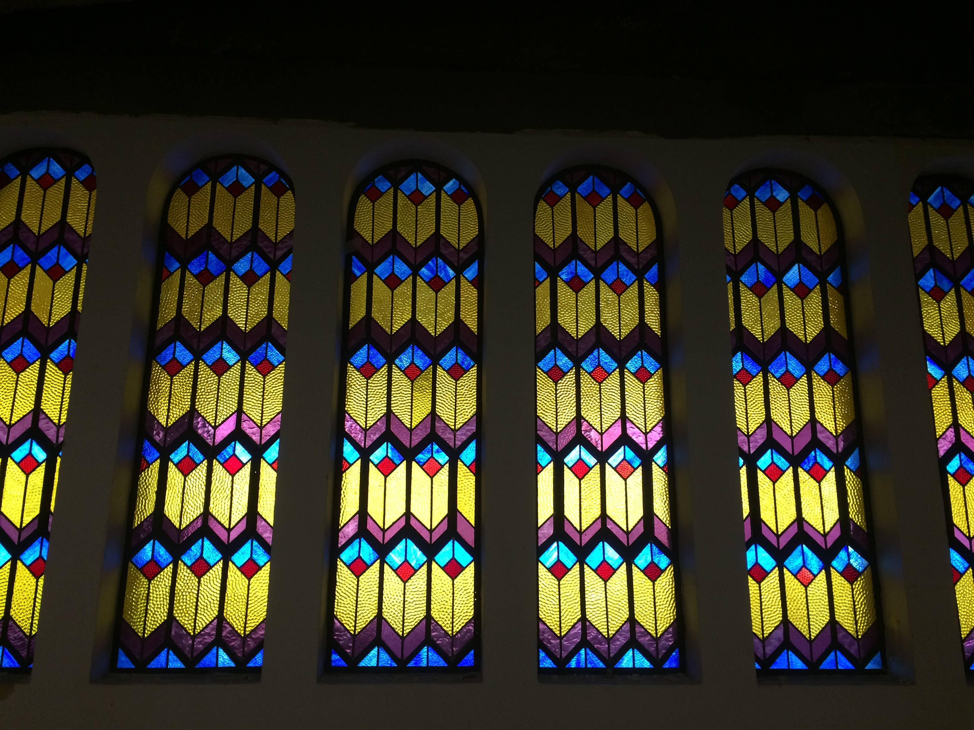 Vitral do Salão Principal do Museu Judaico de São Paulo em obras, São Paulo (SP), Brasil